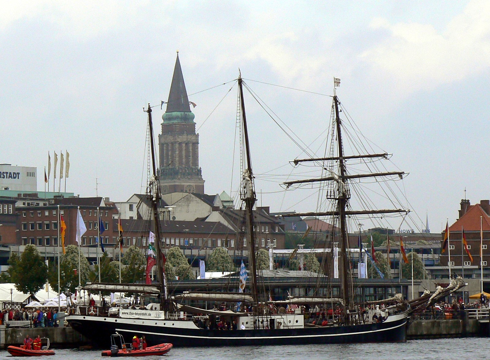 Segelschiff Thor Heyerdahl im Kieler Hafen an der Hörn; im Hintergrund der Kieler Rathausturm.